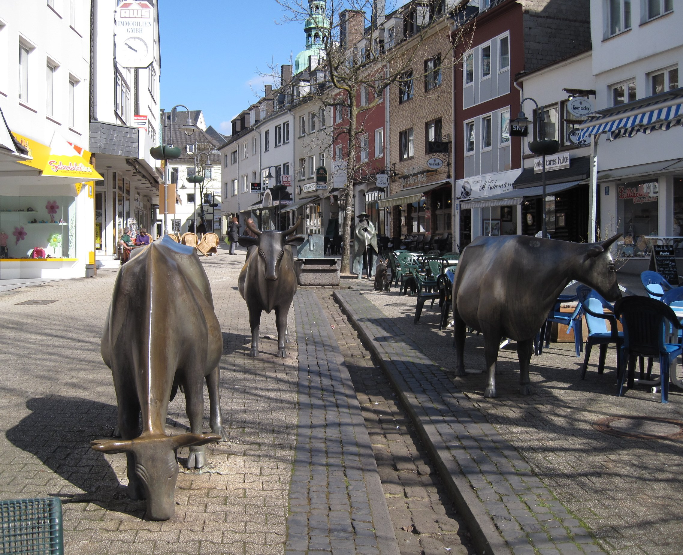 Skulpturen an der Brunnenanlage Alte Poststraße (1986). Hirtenbrunnen des Künstlers Wolfgang Kreutter in Siegen.